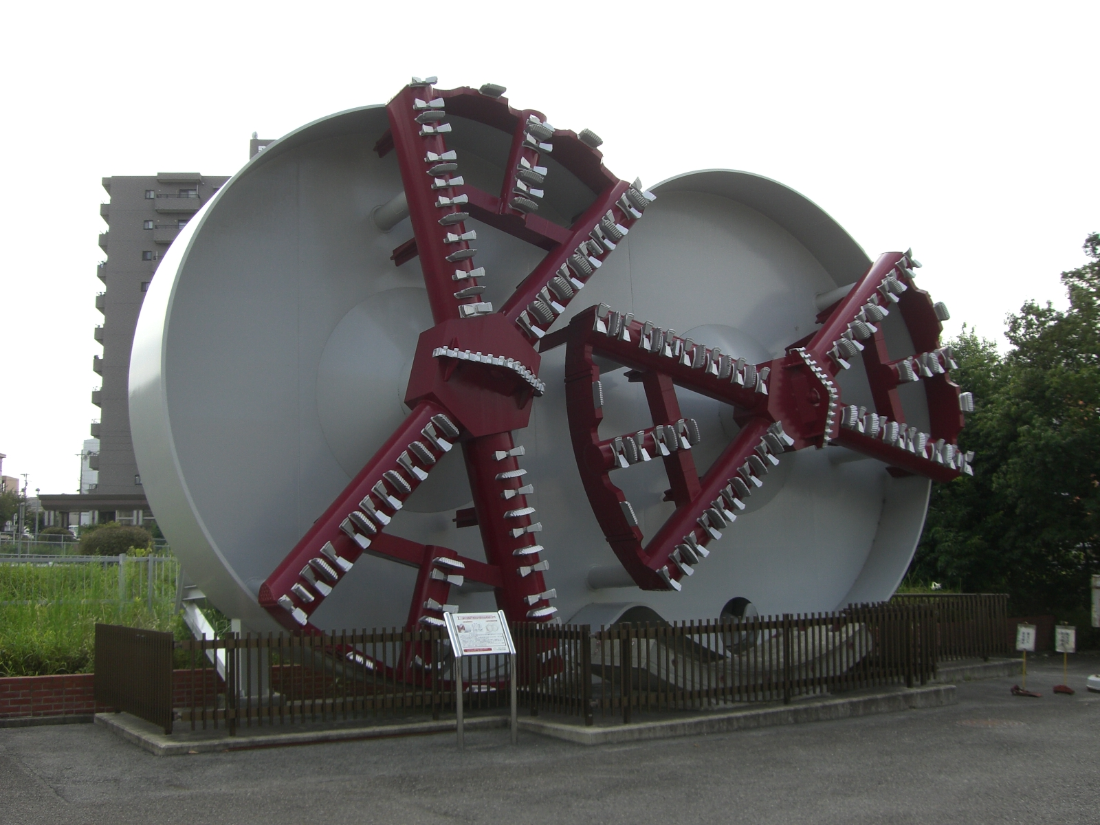 名古屋市交通局日進工場保存のシールドマシン